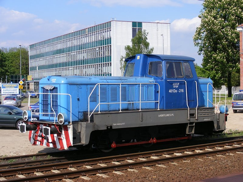 Spalinowa lokomotywa manewrowa 401Da-216 należąca do Stowarzyszenia Kolejowych Przewozów Lokalnych stoi na stacji w Swarzędzu.